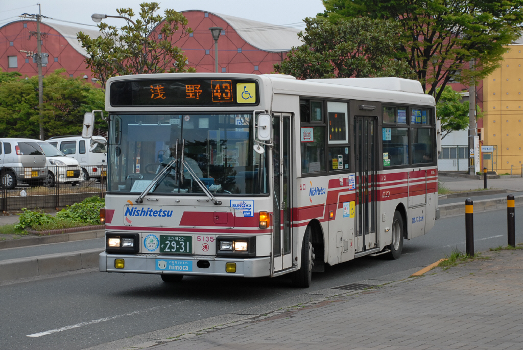 浅野営業所到着入庫 2014-4-26